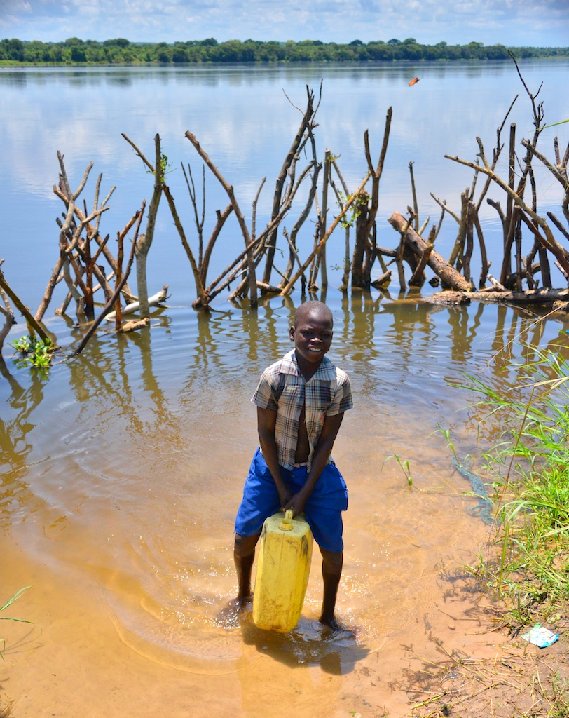 Nile River.